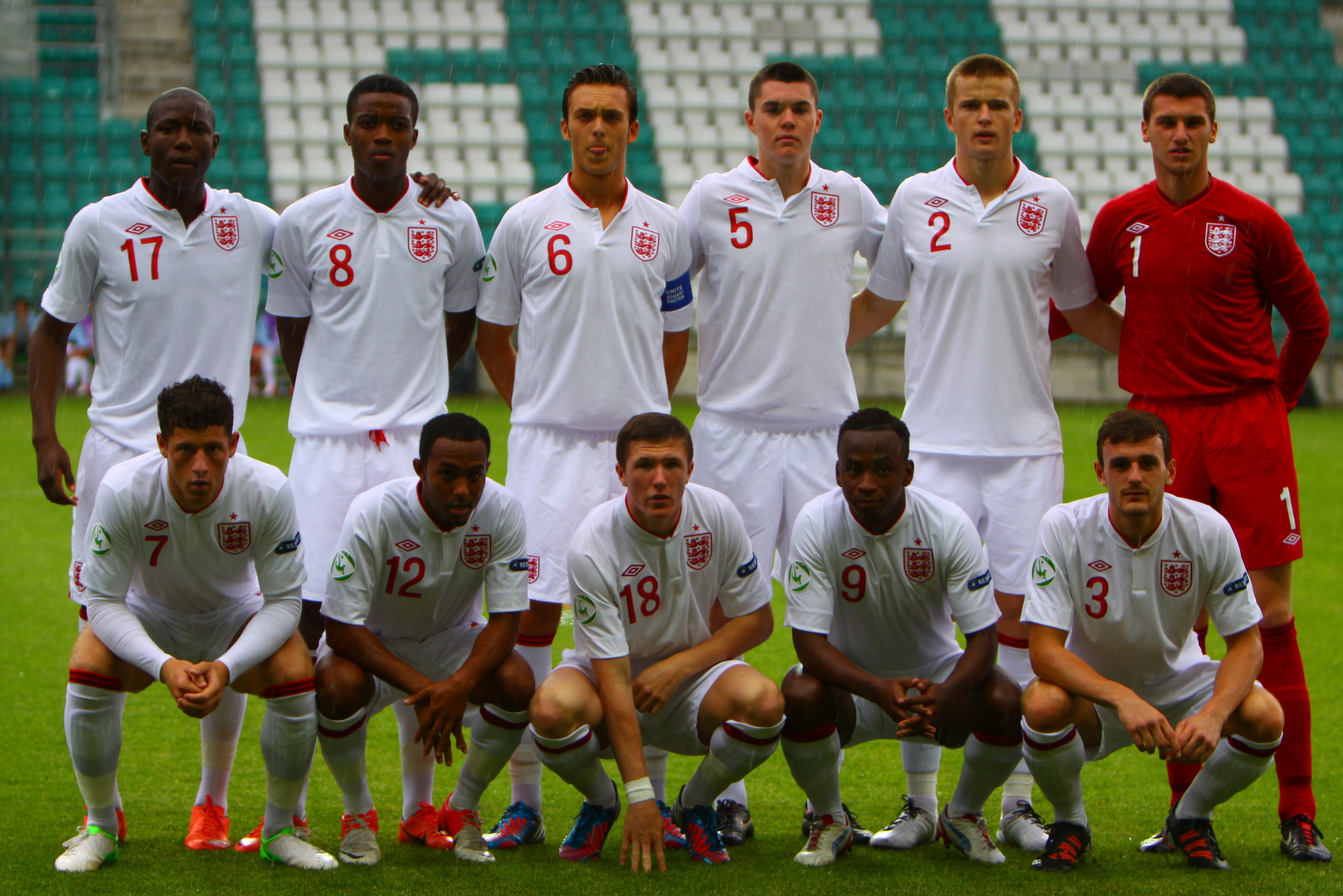 1-Sam Johnstone 2-Eric Dier 3-Jack Robinson 5-Michael Keane 6-Thomas Thorpe 7-Ross Barkley 8-Nathiniel Chabolah 9-Saido Berahino 12-Robert Hall 17-Benik Afobe 18-John Lundstram